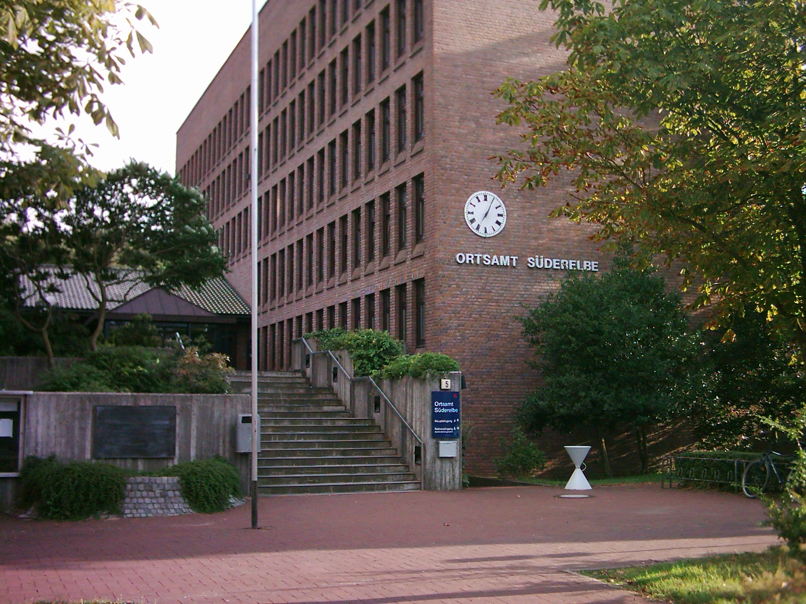 Das Ortsamt Süderelbe in Hamburg-Neugraben, Bezirk Hamburg-Harburg. Links im Bild eine Gedenktafel für Opfer des 2. Weltkriegs.